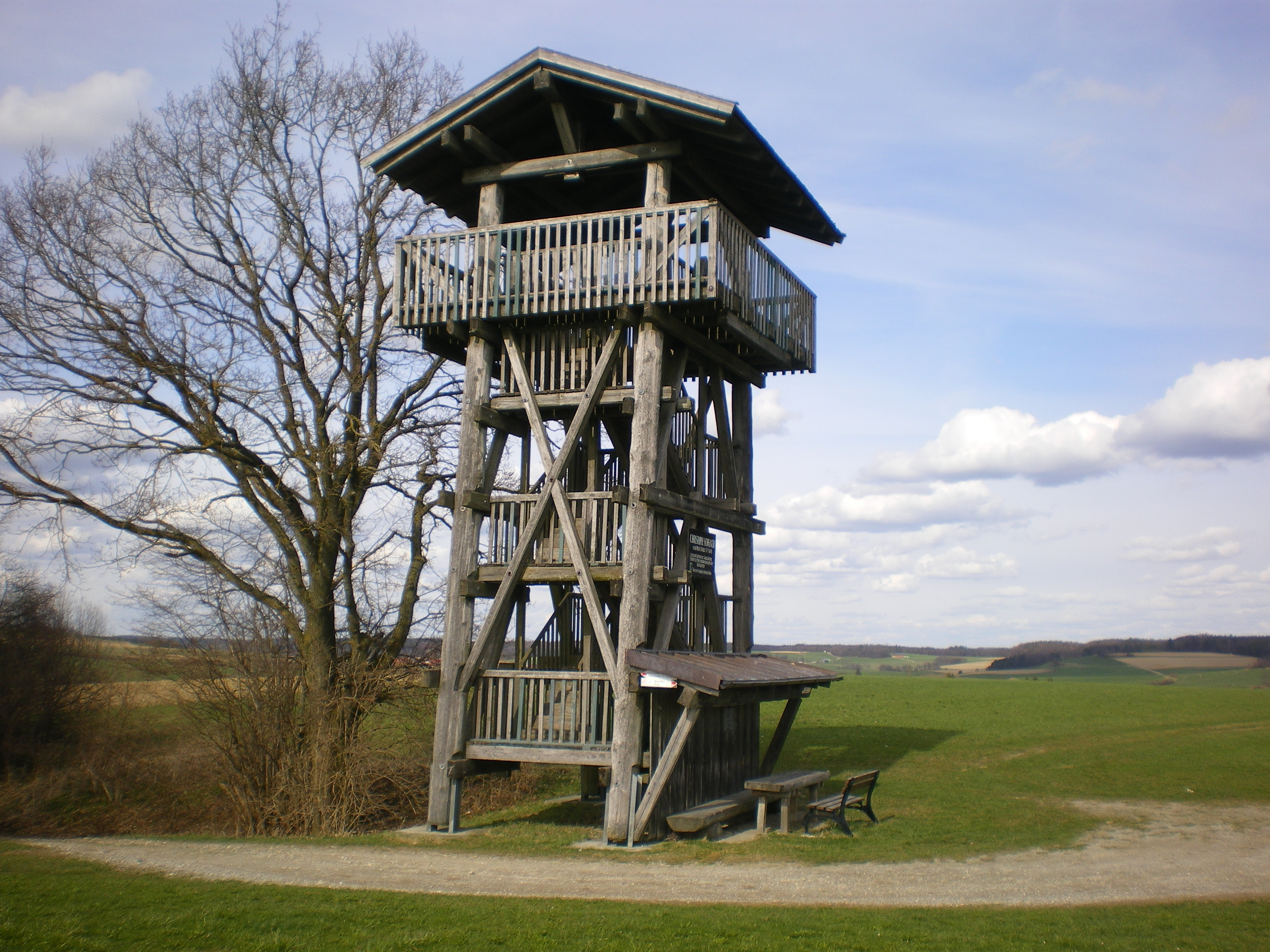 Christoph Scheiner Turm bei Markt Wald; 1988 erbaut und besteht aus Holz. Attention: The name of the picture is false; it's Christoph Scheiner Turm and not Christopph-Schreiner-Turm!